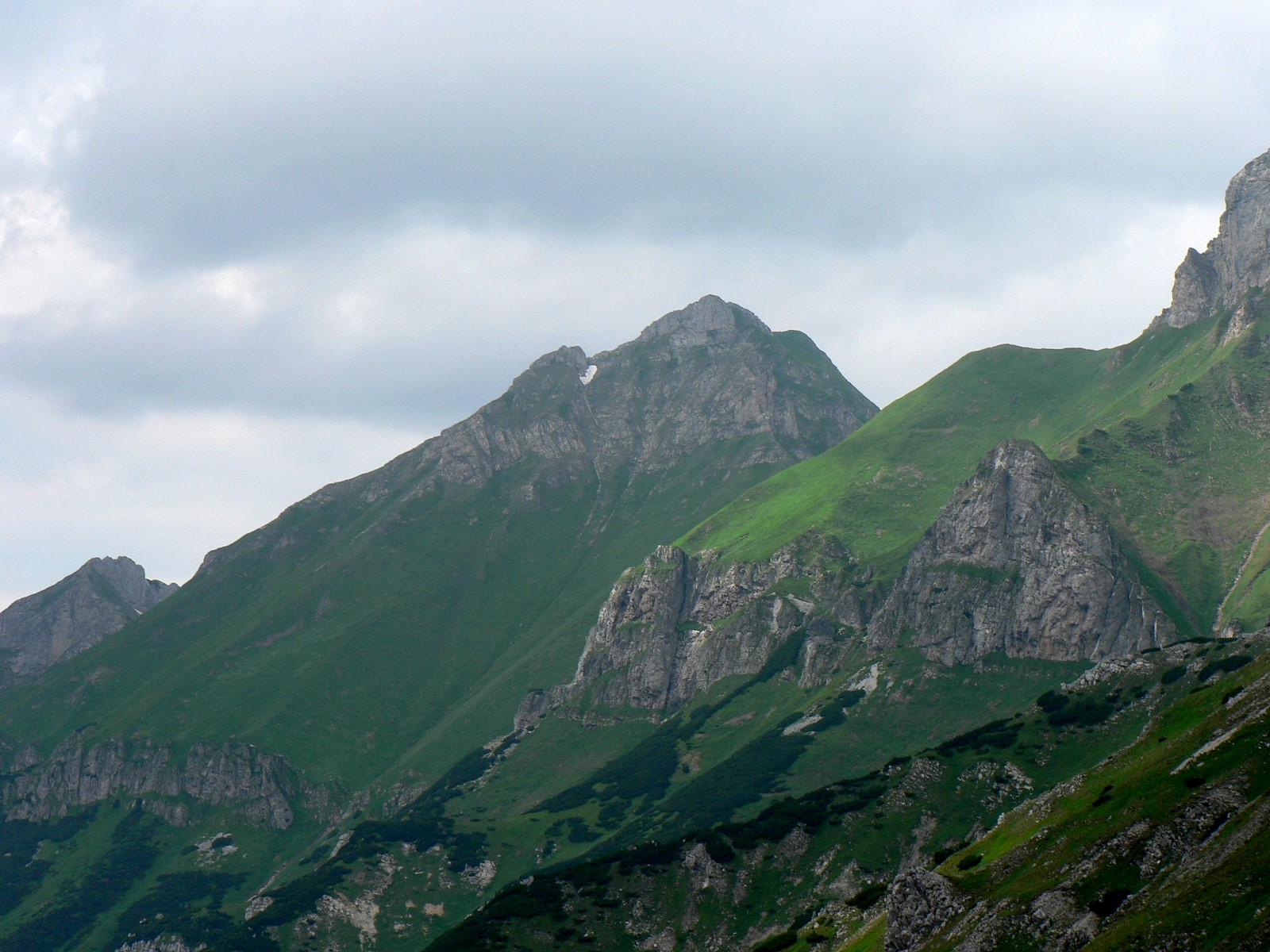 Widok na Hawrań z Wyżniej Przełęczy pod Kopą